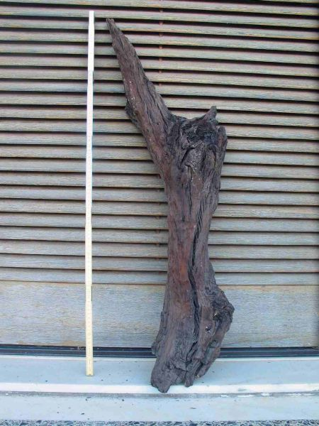 Einen Meter lang und rund 3570 Jahre alt ist der auf der Insel Santorin in einer Bimsschicht aus der Zeit der Minoischen Eruption gefundene Olivenbaumast. Der Baum wurde in Lebendposition von der nach dem Vulkanausbruch in gewaltiger Menge herab regnenden Asche begraben.